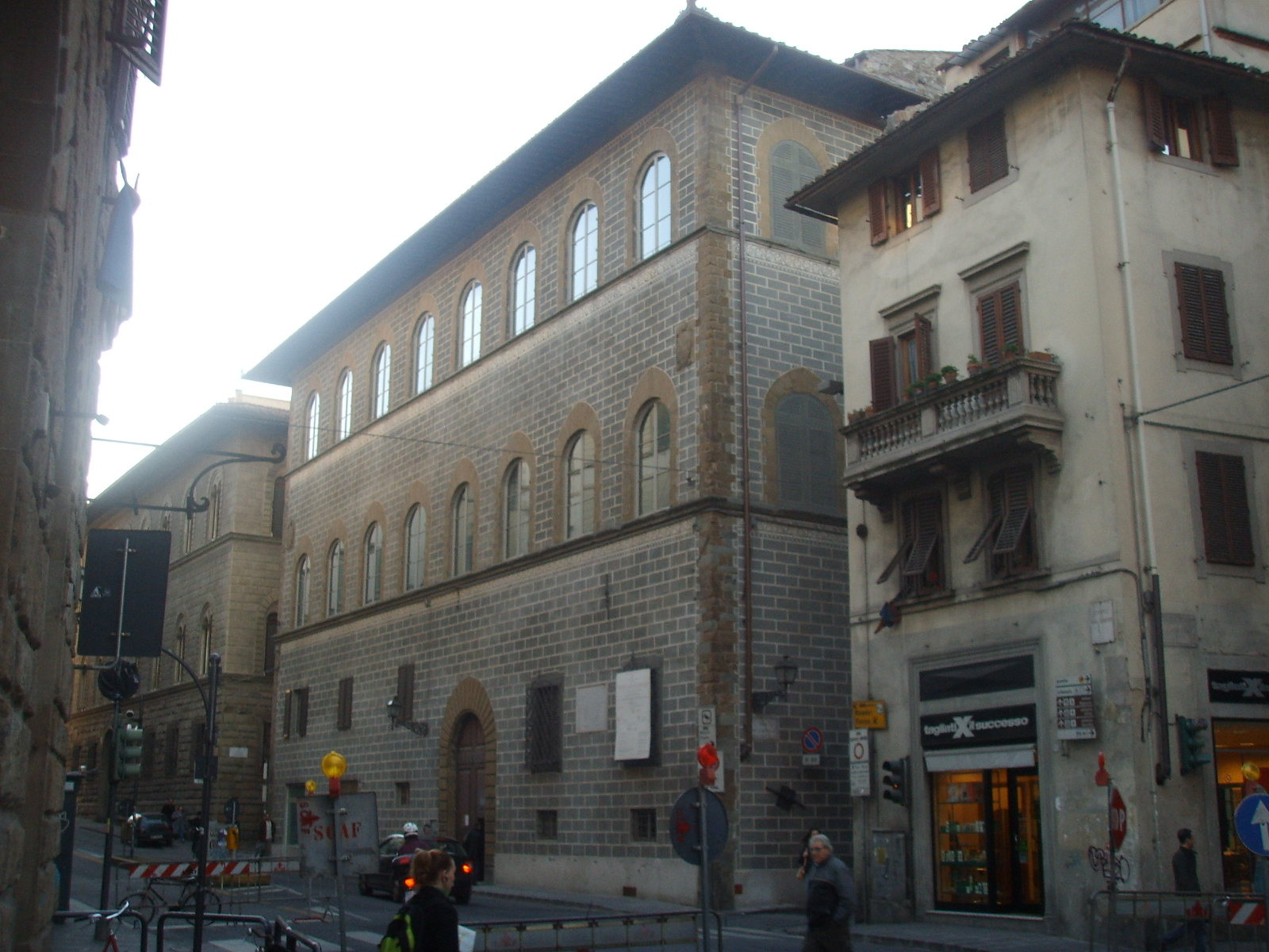 Palazzo de' Bardi